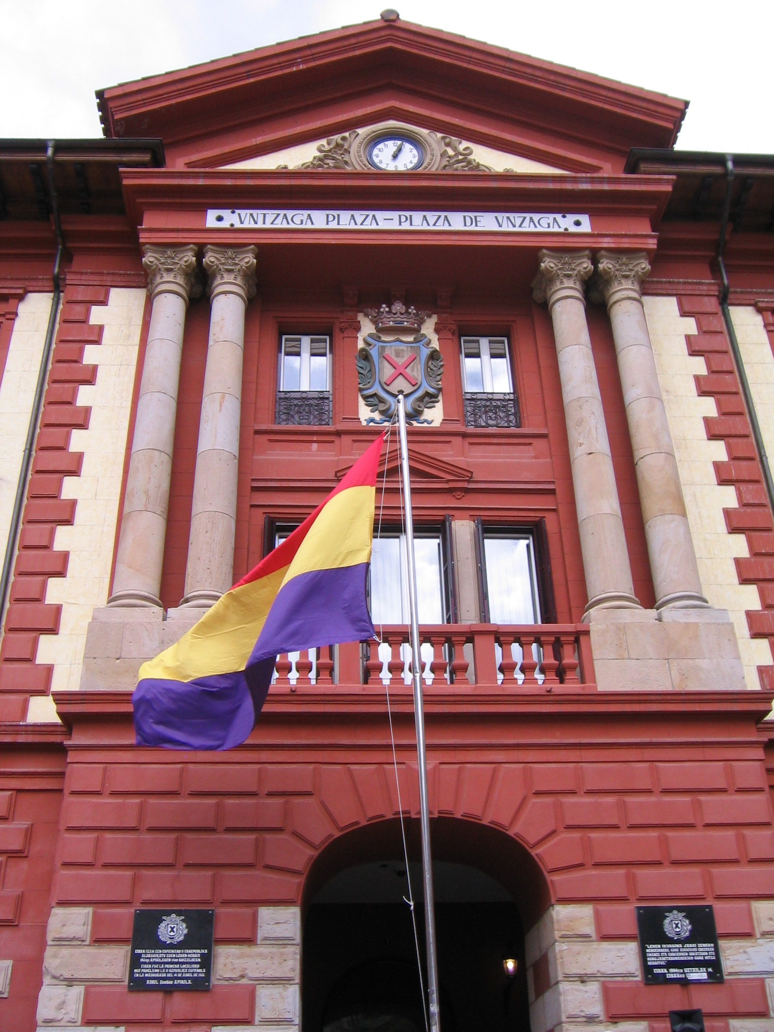 Izaiento de la bandera republicana en Eibar. Conmemoración del 77 aniversario de su proclamación.